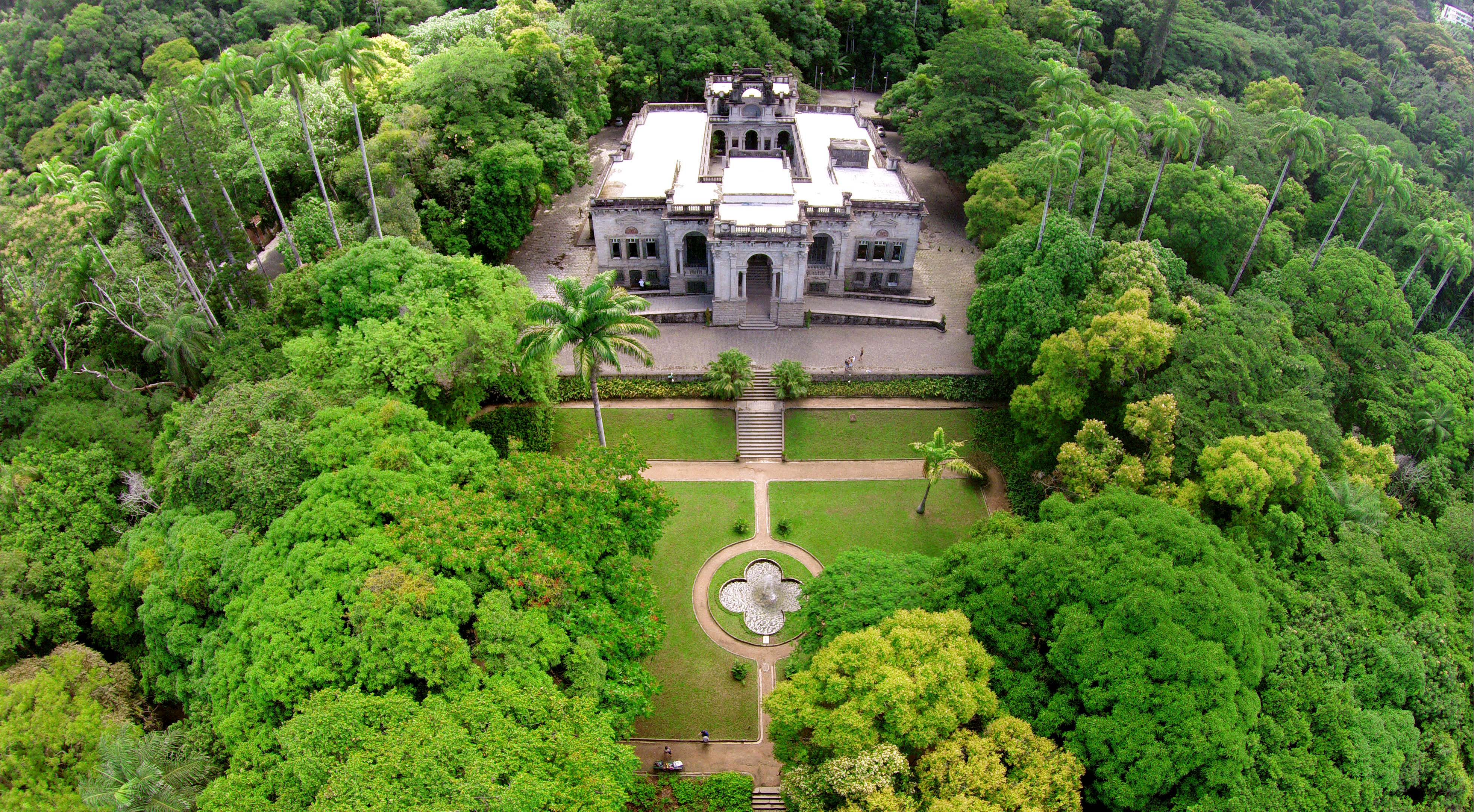 Foto aérea do Parque Lage no Rio de Janeiro